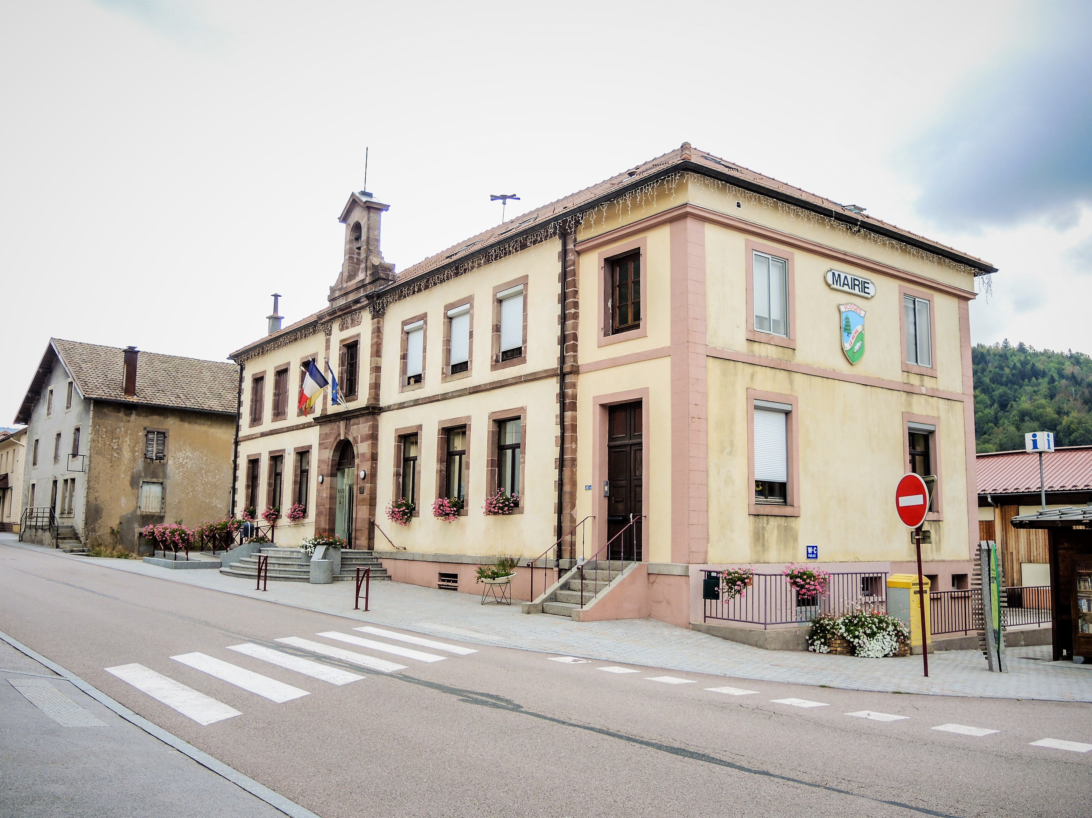 Mairie du village du Ménil. Vosges